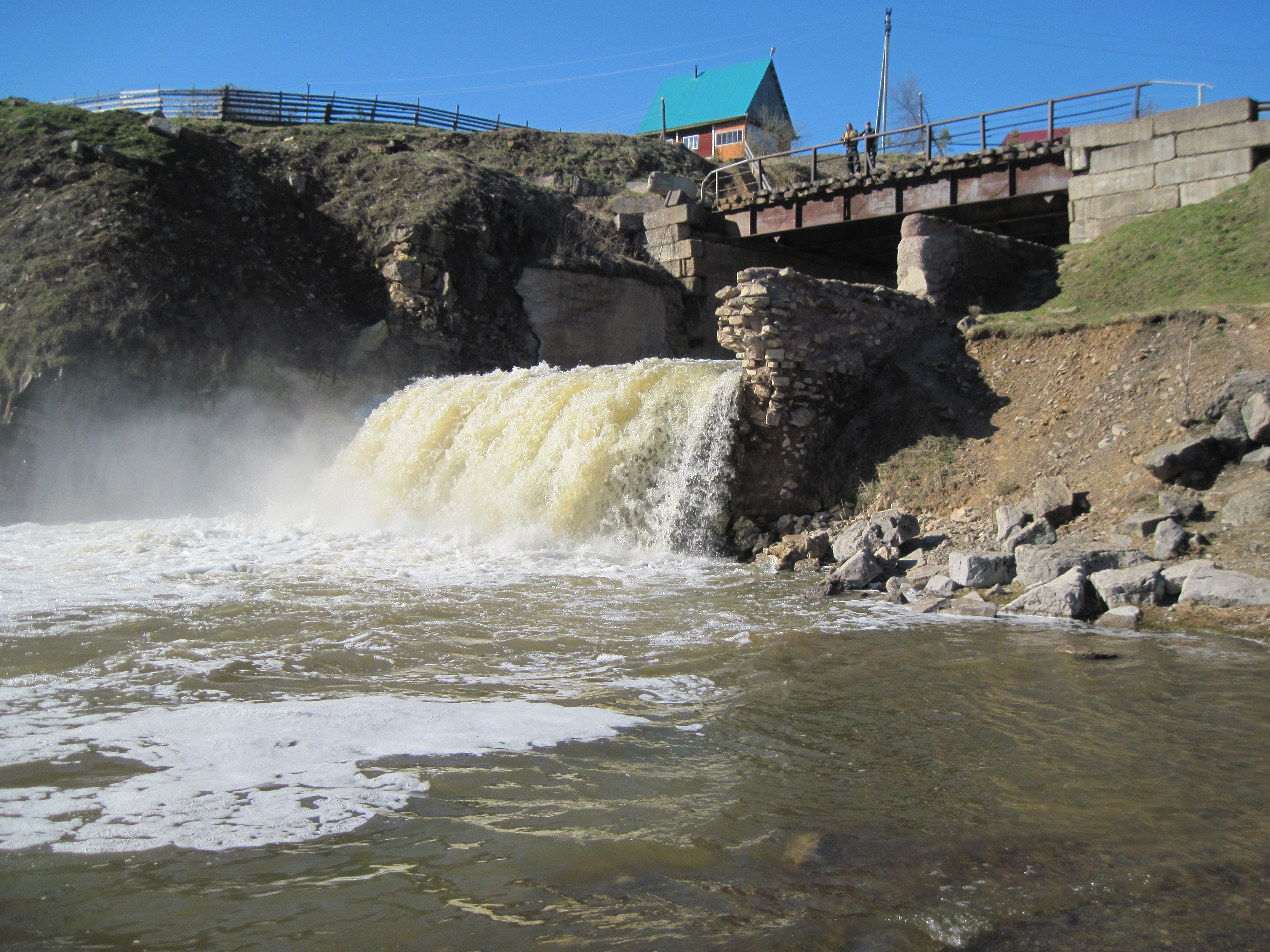 Плотина: Кусье-Александровский, Горнозаводский район, Пермский край